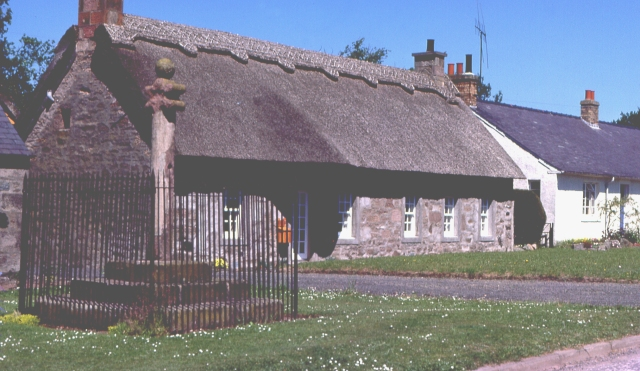 Kinrossie